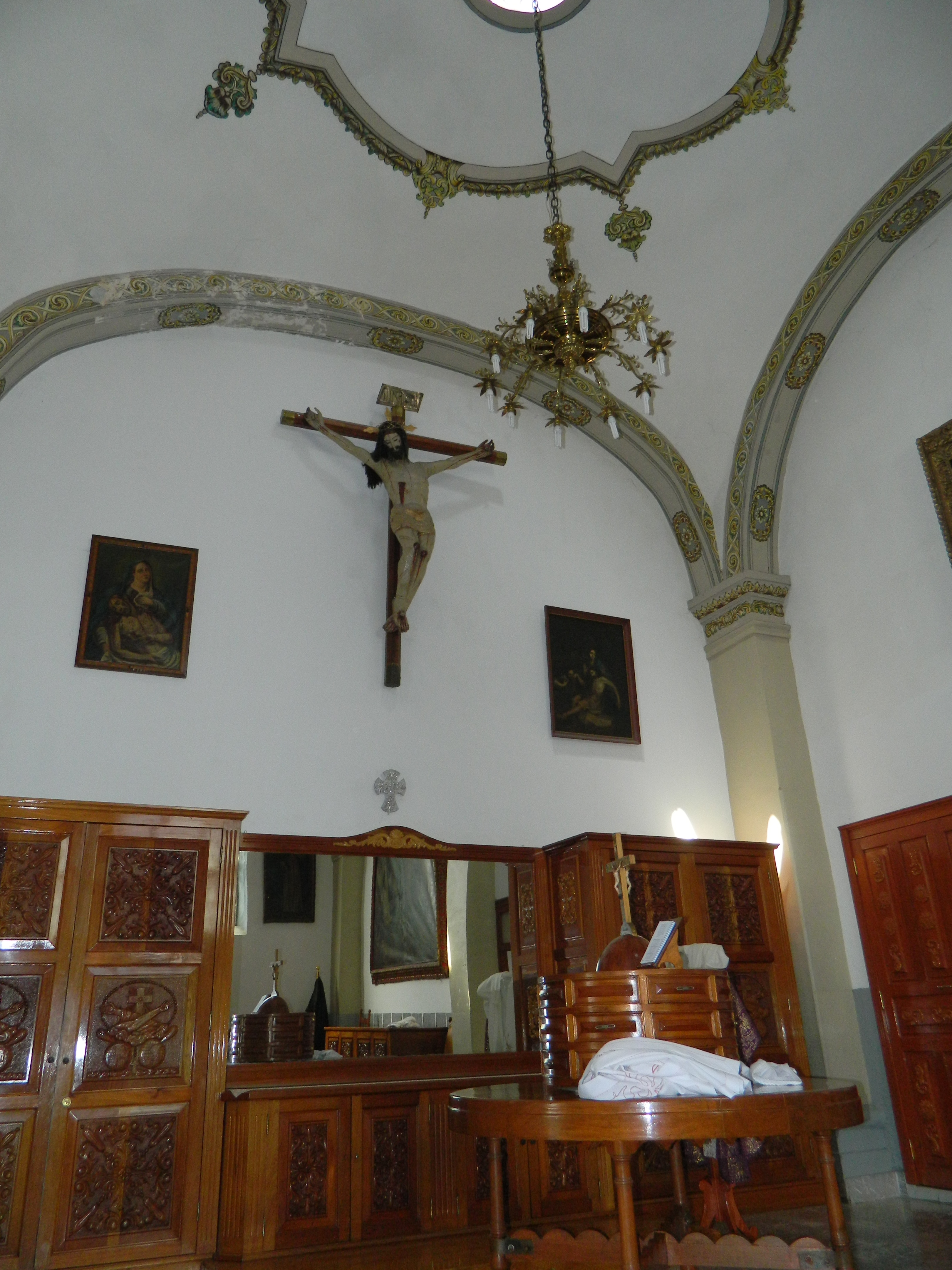 Sacristia De La Parroquia de San Juan Bautista Coyoacán.